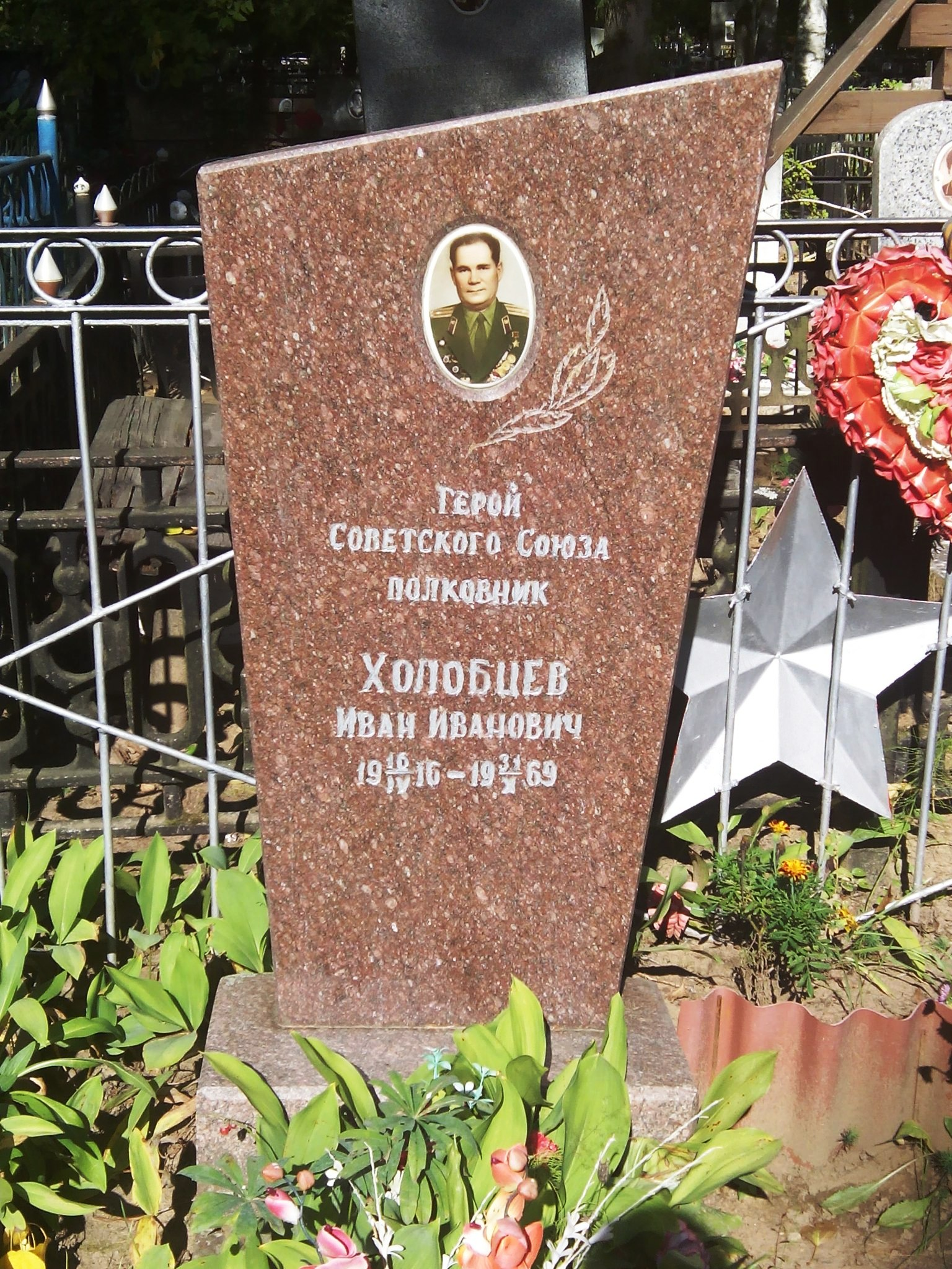 Герой Советского Союза. Полковник